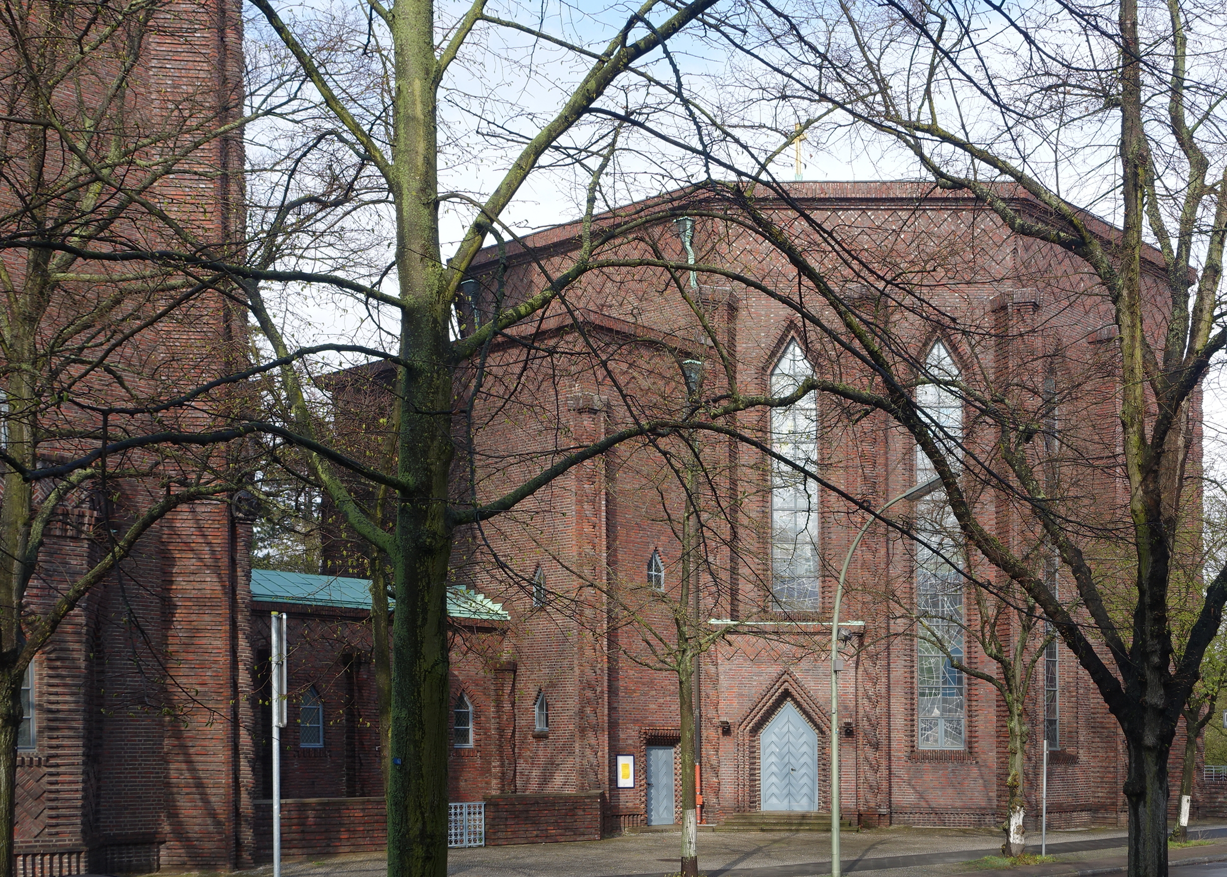 Kirchenschiff der Kreuzkirche